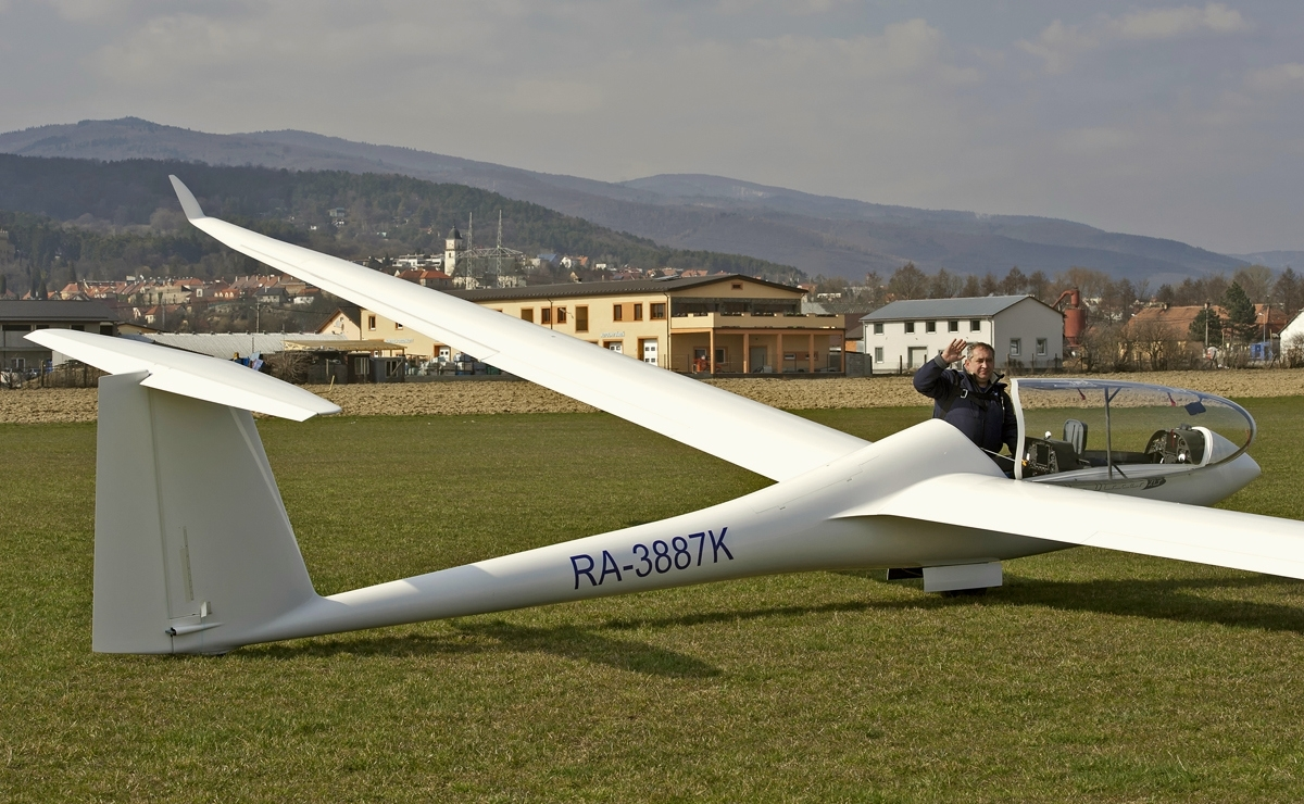 Prievidza.Slovakia